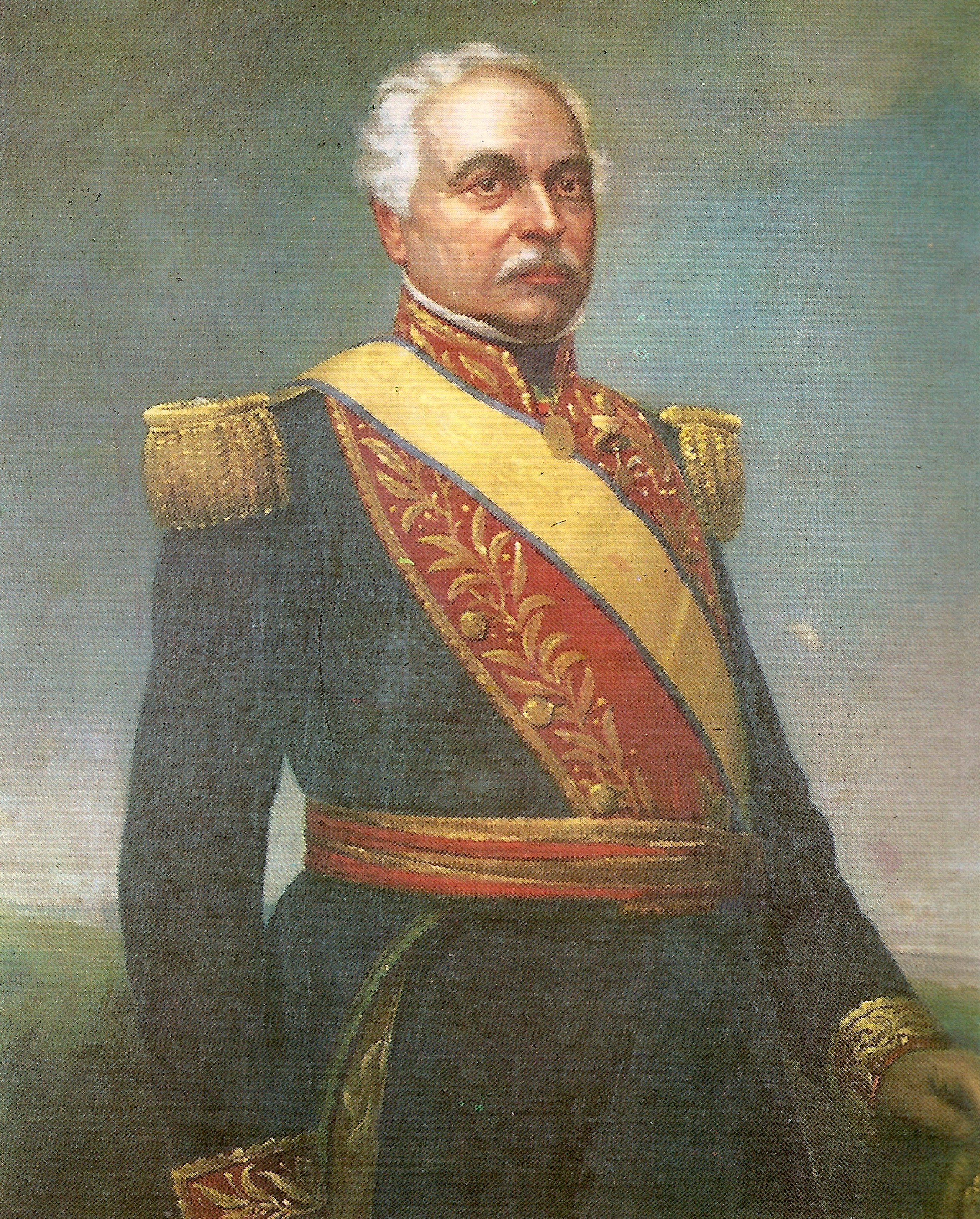 Martín Tovar y Tovar:Retrato de Jose Antonio Paez Oleo sobre tela coleccion del Palacio Federal. Caracas - Venezuela